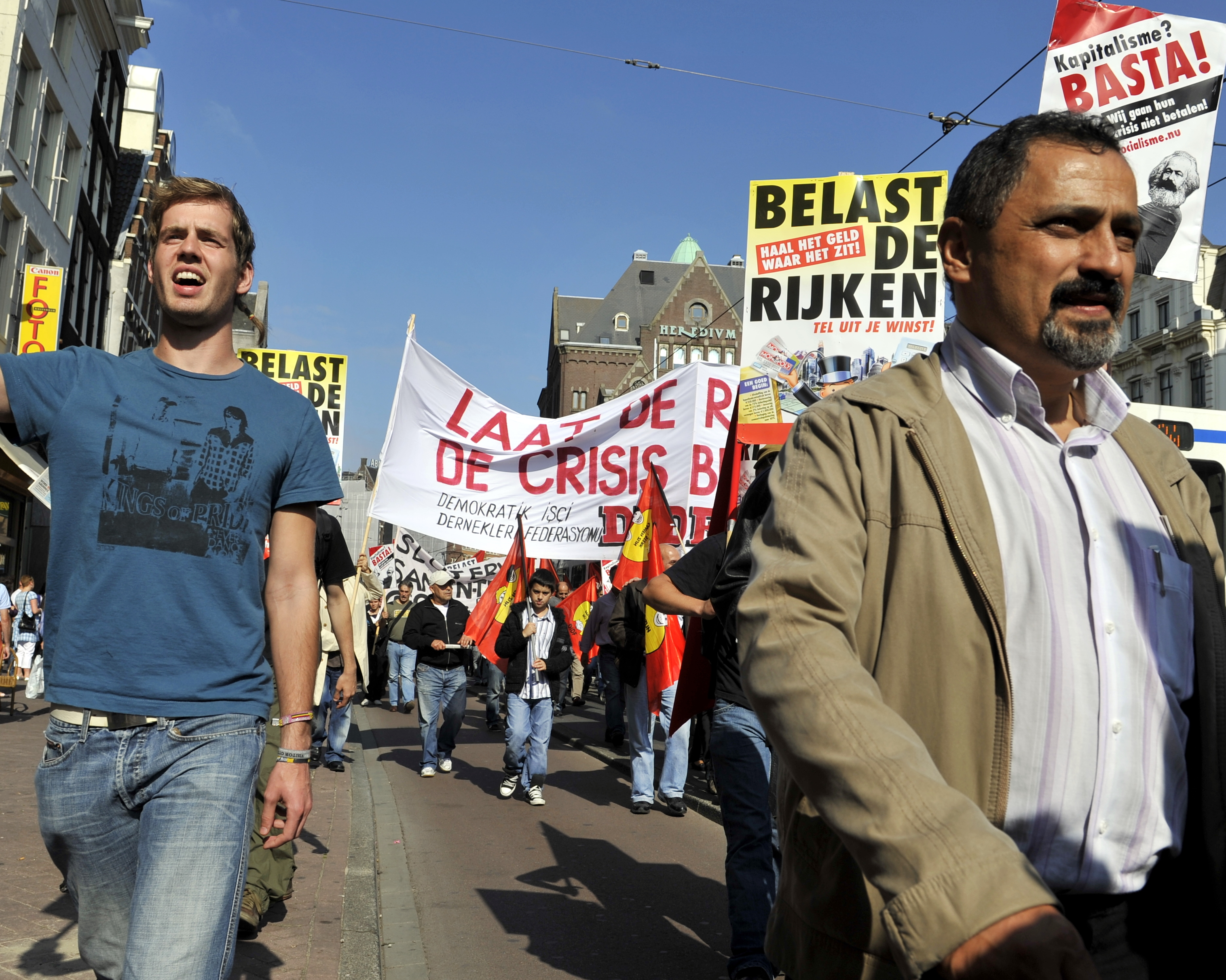 Omsingel De Nederlandsche Bank